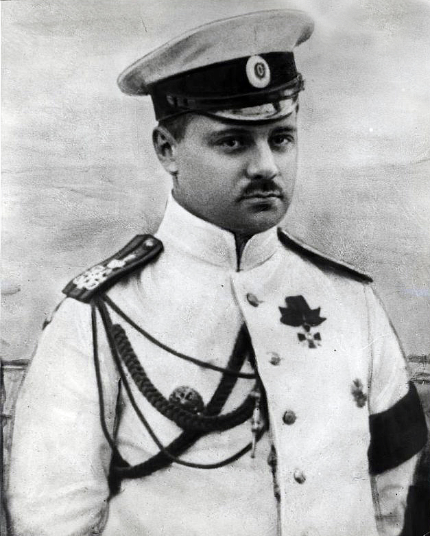 Boris Vilkitsky